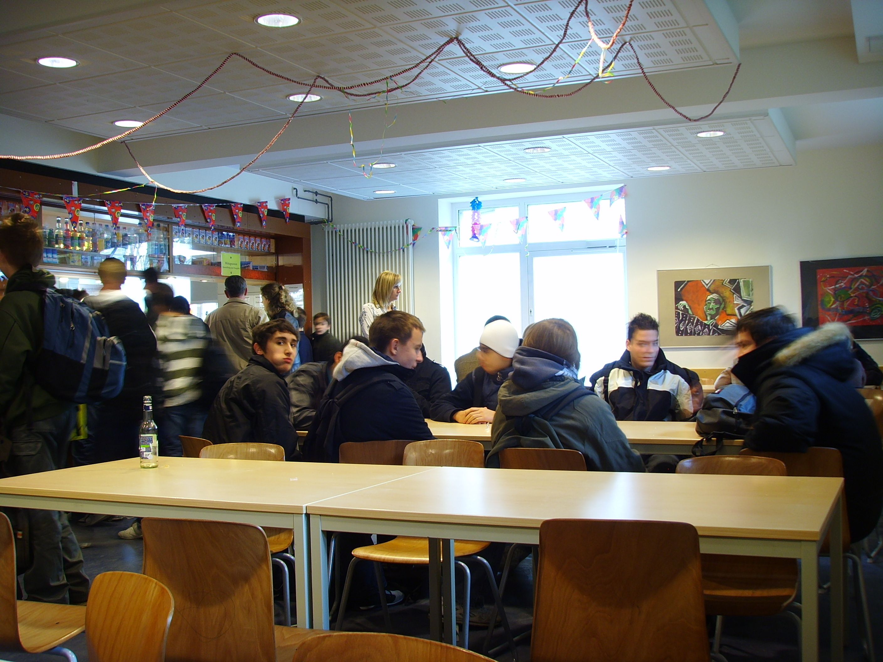 Ziehenschule, Frankfurt am Main-Eschersheim, Caféteria